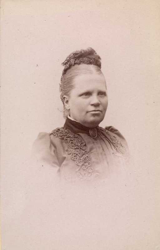 Portrett av Bolette Gjør, kvinne, forfatter, redaktør, misjonsforeningsleder, prestefrue, vignettert brystbilde.